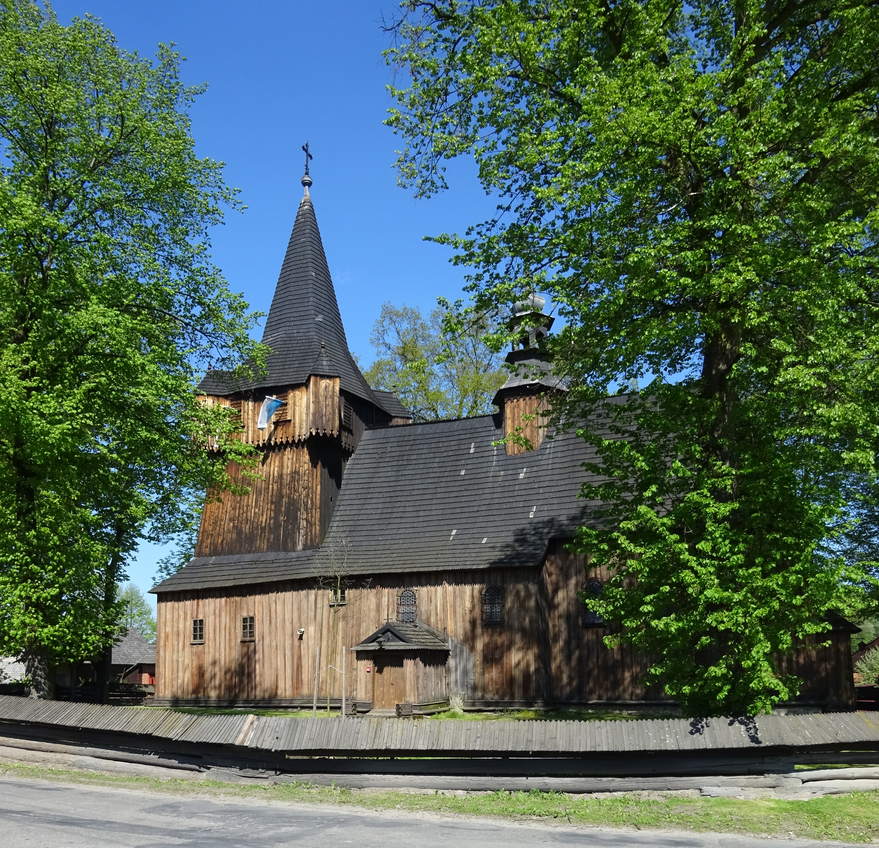 Zabytkowy Kościół Wniebowzięcia Najświętszej Marii Panny w Woli Radziszowskiej. Widok od zewnątrz. 2016